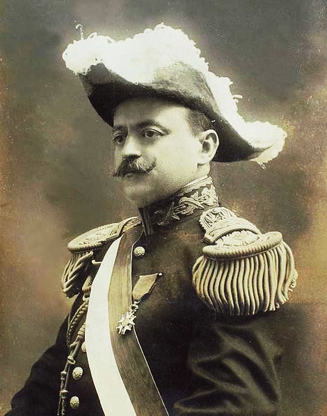 Óscar Raimundo Benavides Larrea fue un militar y político peruano, Presidente Provisorio del Perú en dos ocasiones, de 1914 a 1915, designado por el Parlamento bicameral tras el golpe de Estado al presidente Guillermo Billinghurst; y de 1933 a 1939, designado por el Congreso Constituyente.